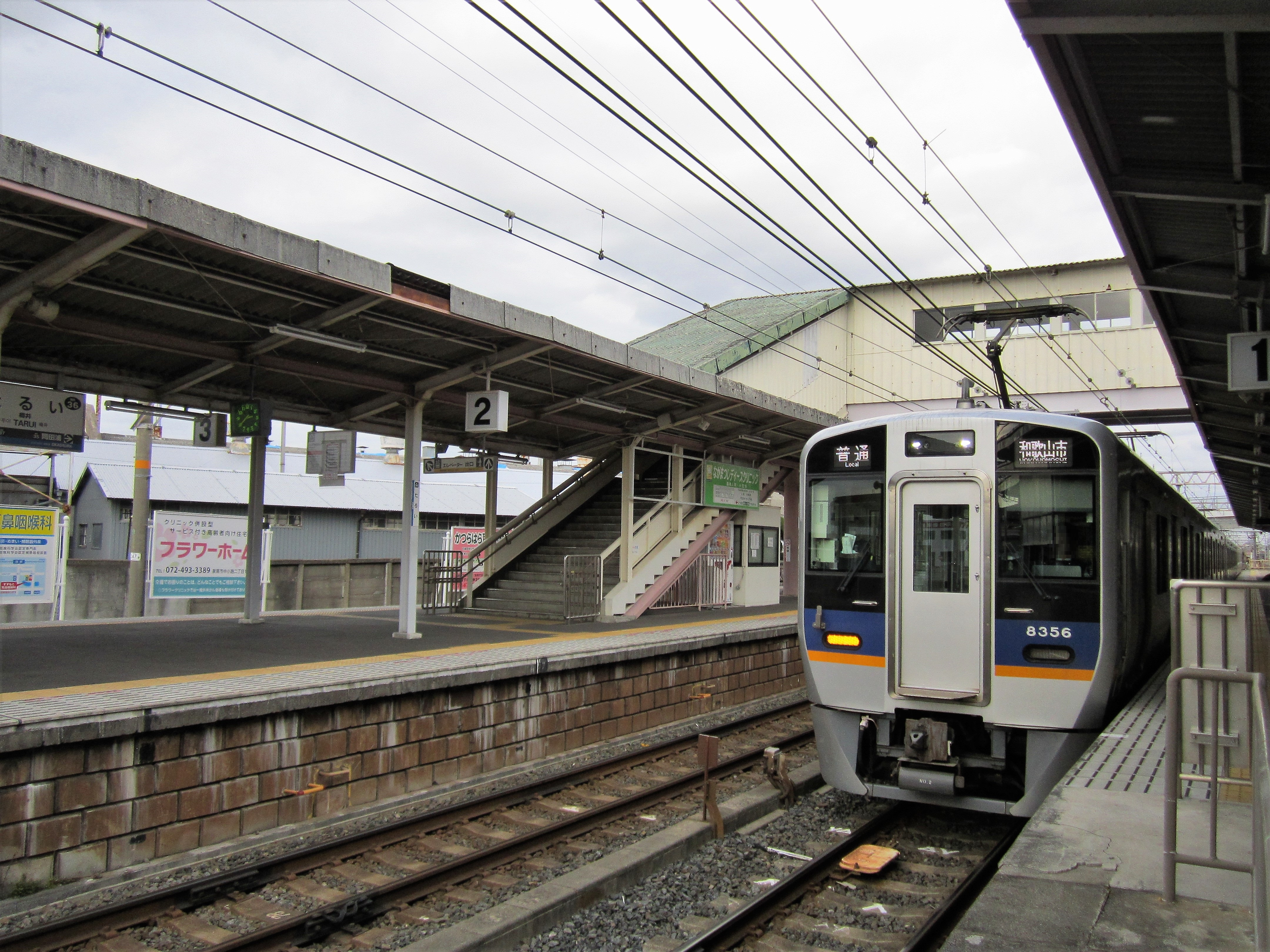 樽井駅1番線に停車中の南海8300系電車 Canon PowerShot A2200